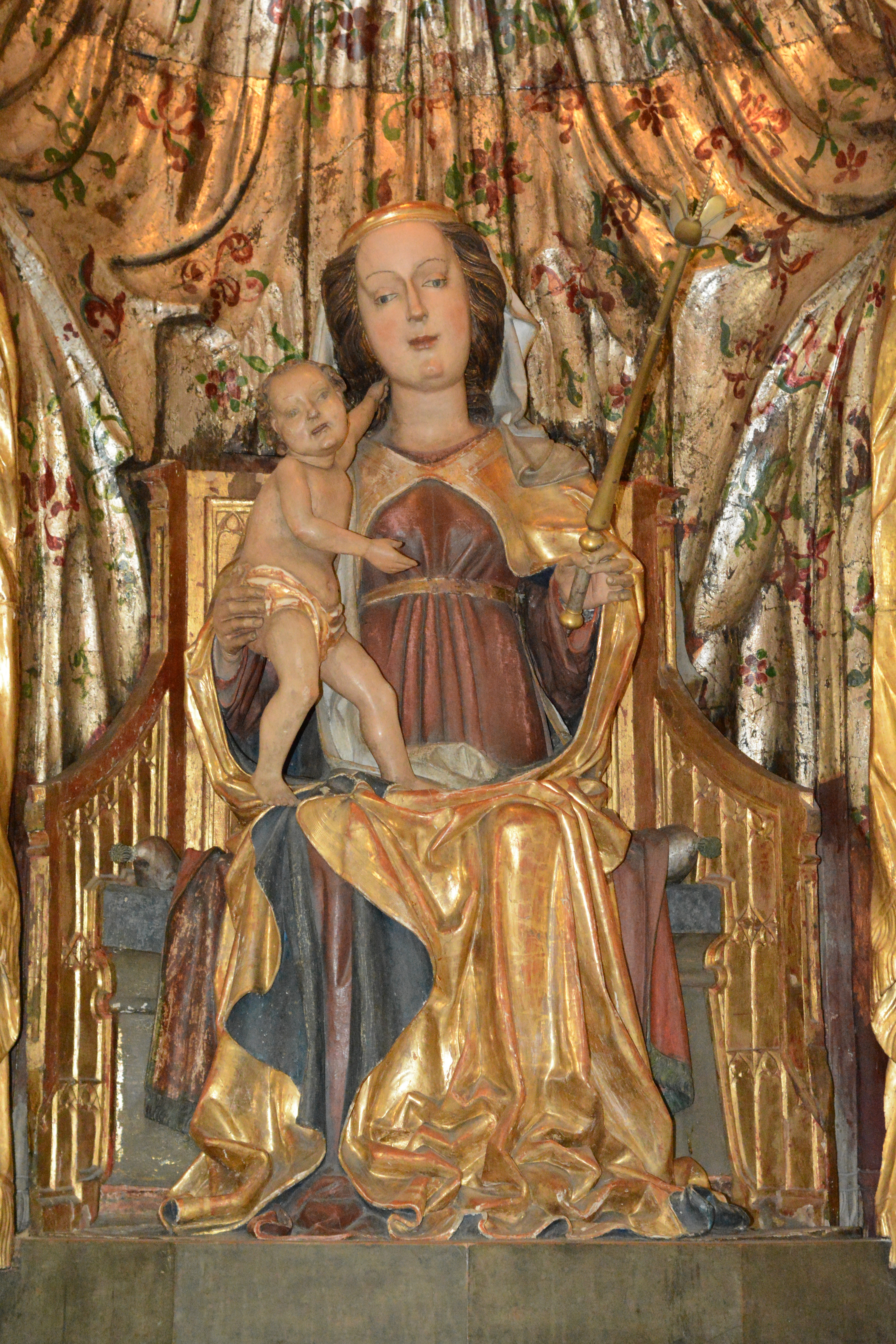 Basilika Seckau, Südturm-Kapelle, Mariä-Opferungsaltar, Muttergottes mit Kind (1488)